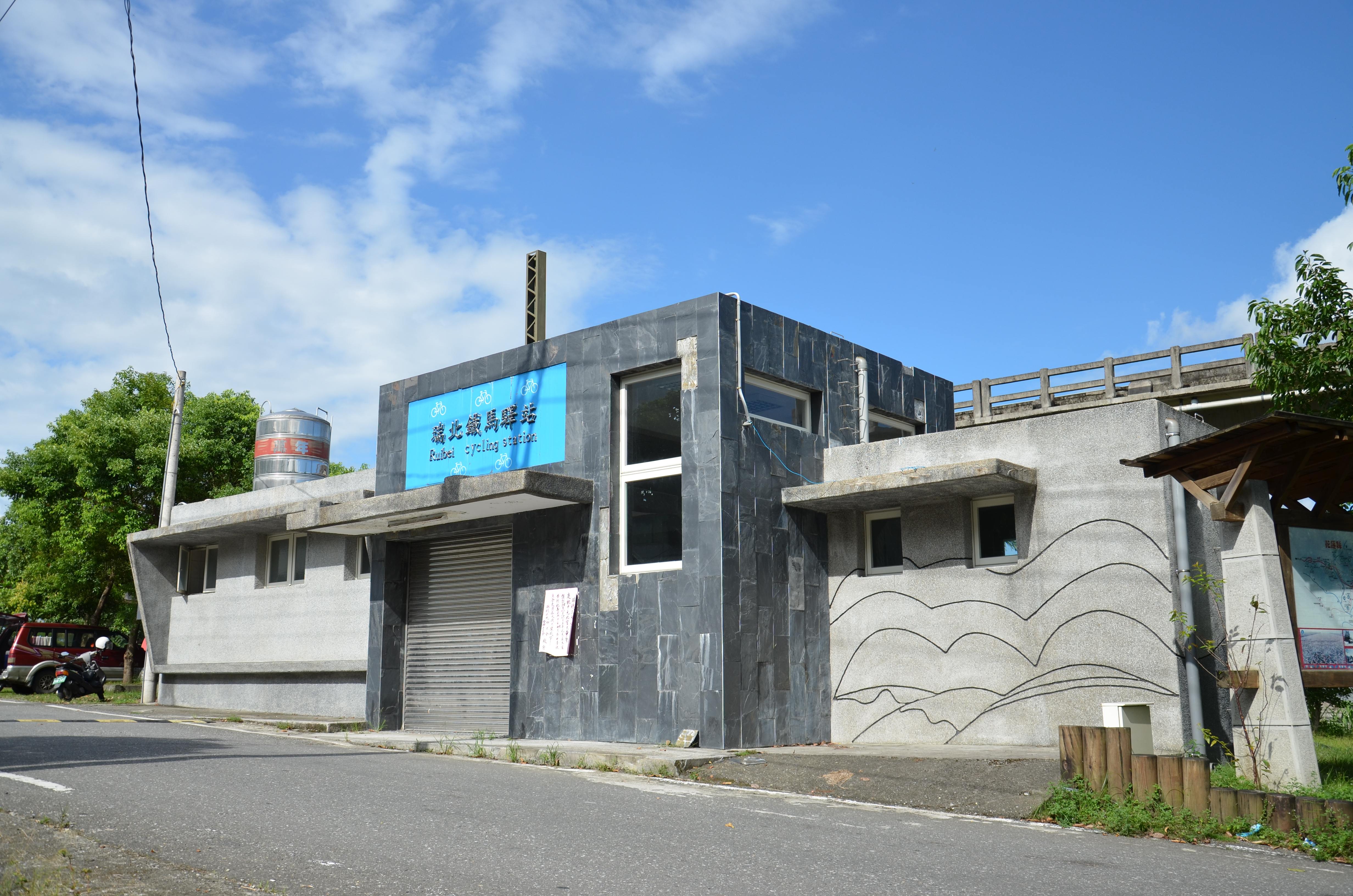 中文（台灣）: 瑞北車站站房。